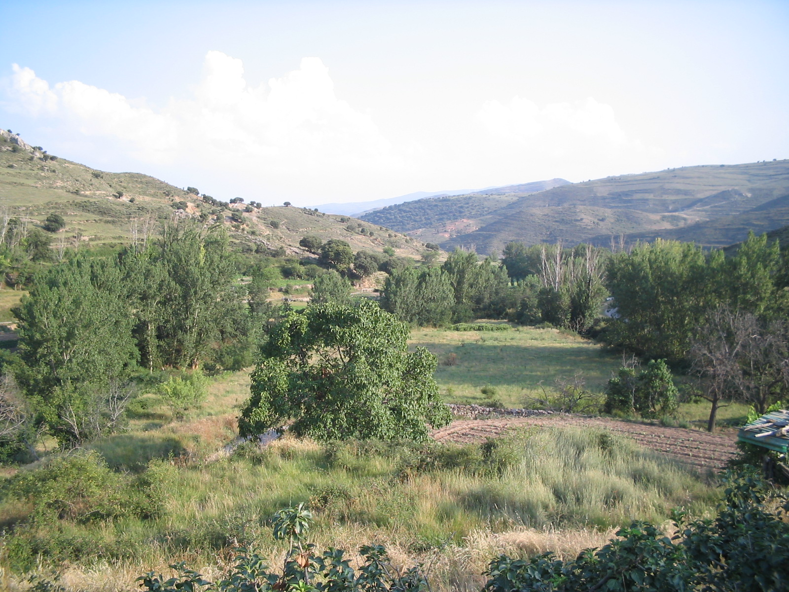 Parte del término municipal de Muro de Aguas que es utilizado para la agricultura y es llamado por sus habitantes el Regadío, ya que además se puede regar las huertas con el agua de la fuente.